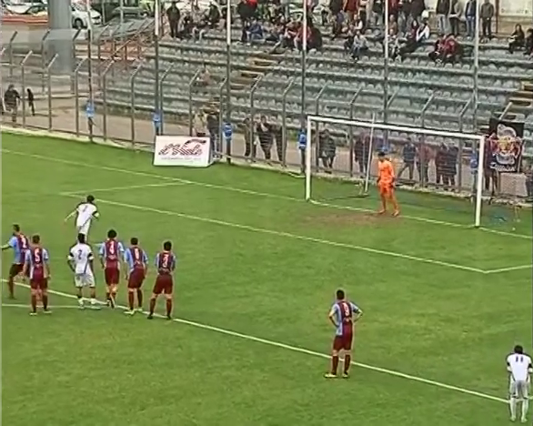 Partita di calcio Rieti-L'Aquila, terminata 4-1, del campionato di serie D disputata il 21 maggio 2017 allo stadio Centro d'Italia-Manlio Scopigno di Rieti